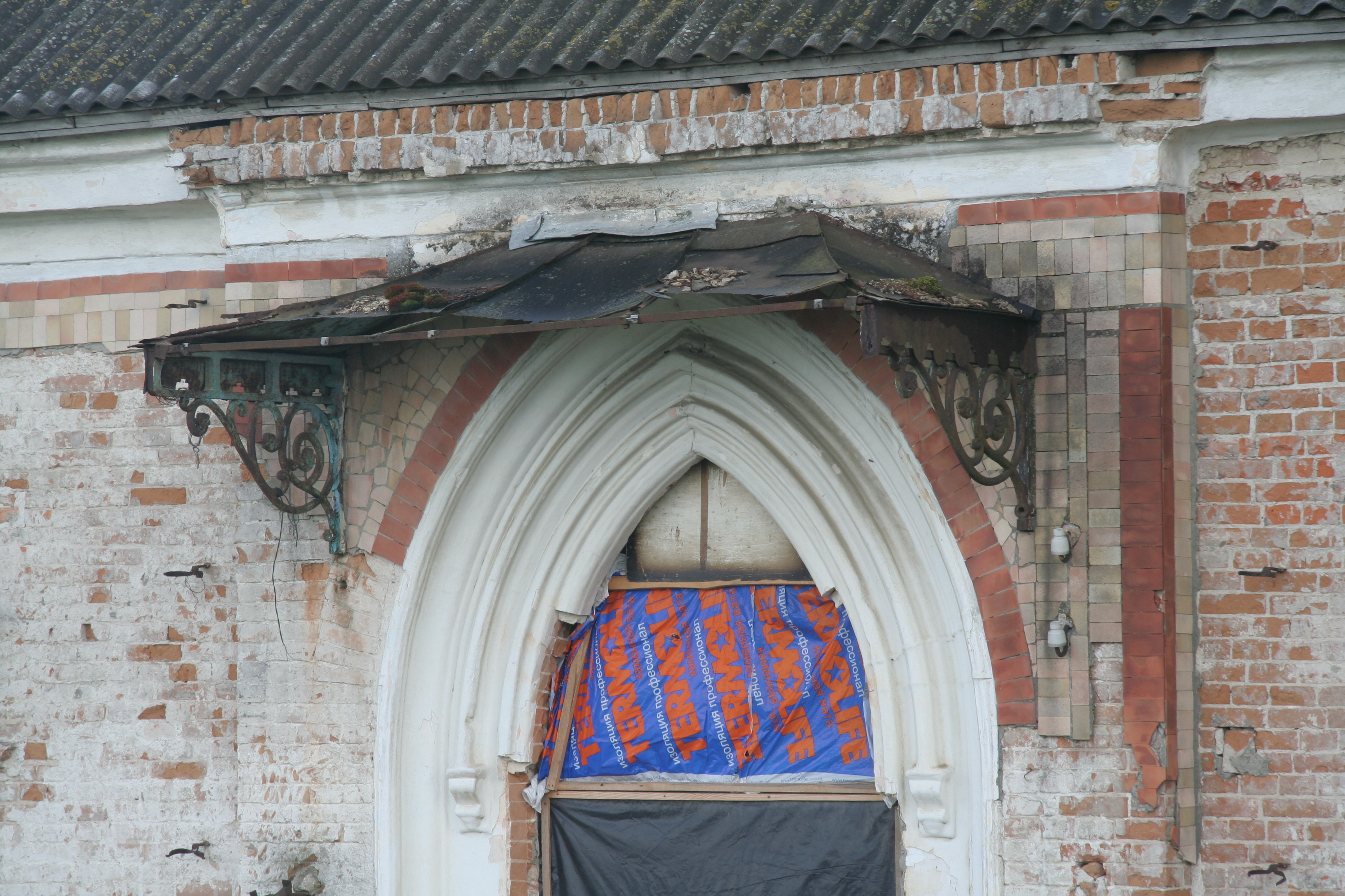 Поштова станція с.Антопіль 315км Е40